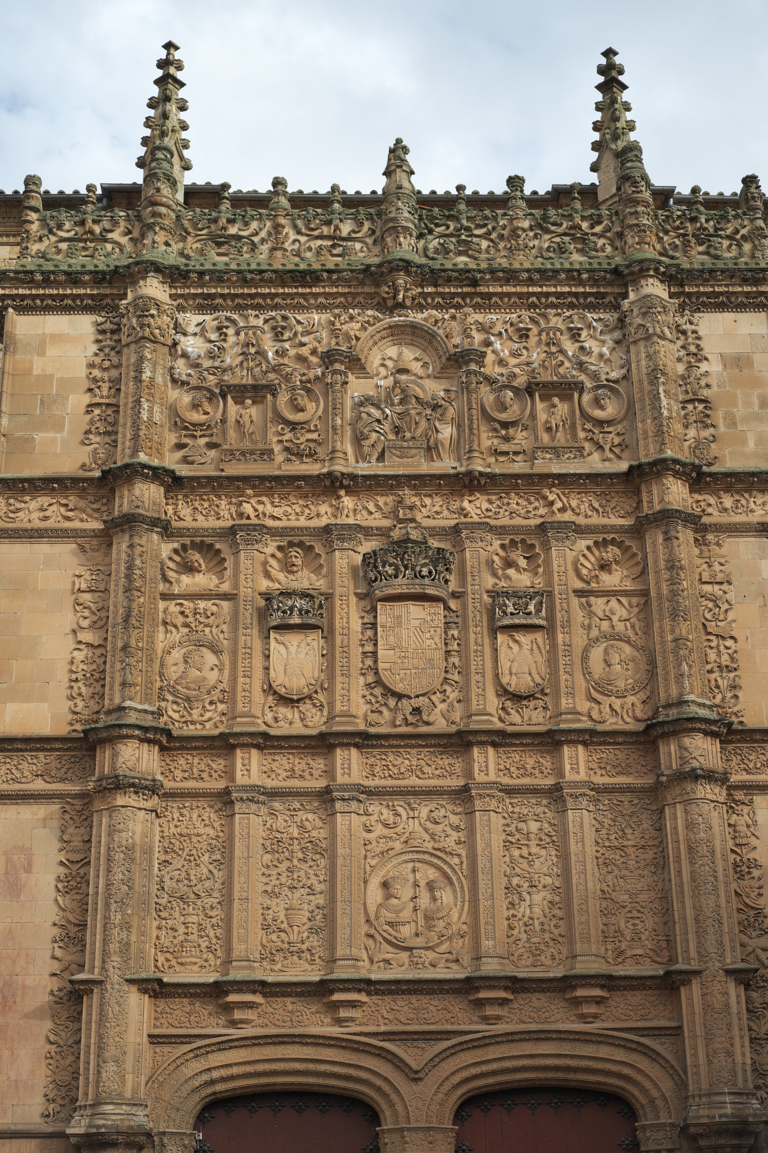 Portalfassade der Escuelas Mayores in Salamanca (Kastilien-León/Spanien)